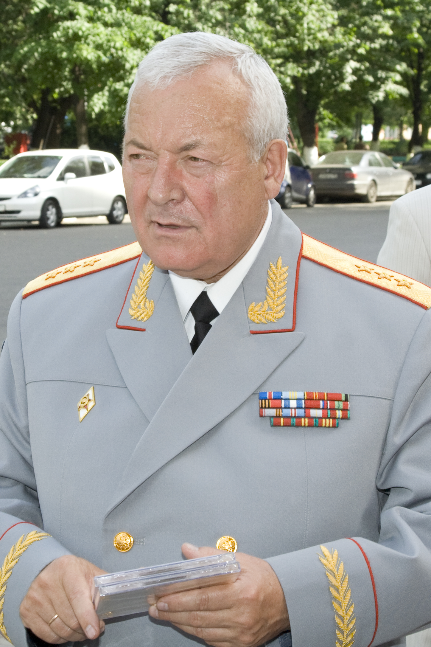 Богданов, Анатолий Анатольевич.